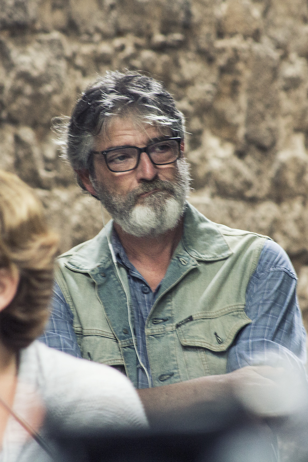 Plaça Sant Felip Neri 19/05/2015 Foto: Marc Lozano